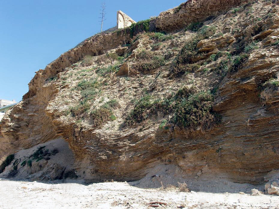 כורכר בחוף הרצליה, צילם דוד שי